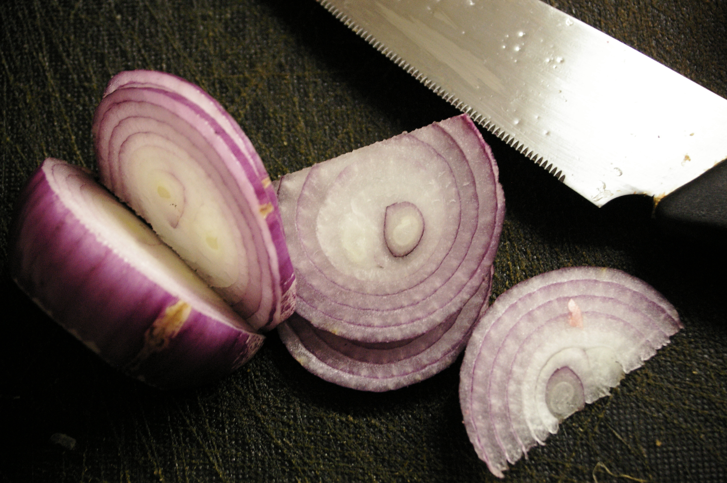 Cebolla siendo cortada.